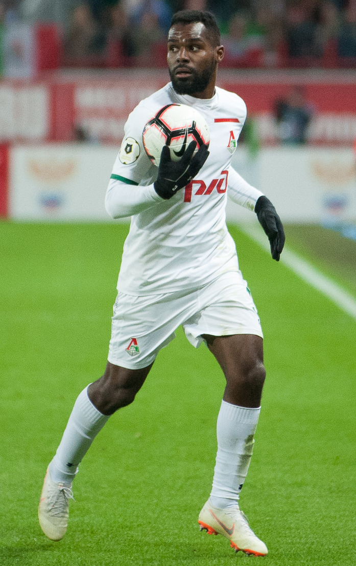 «Локомотив» в матче с «Ахматом» прервал трехматчевую серию без побед в РПЛ